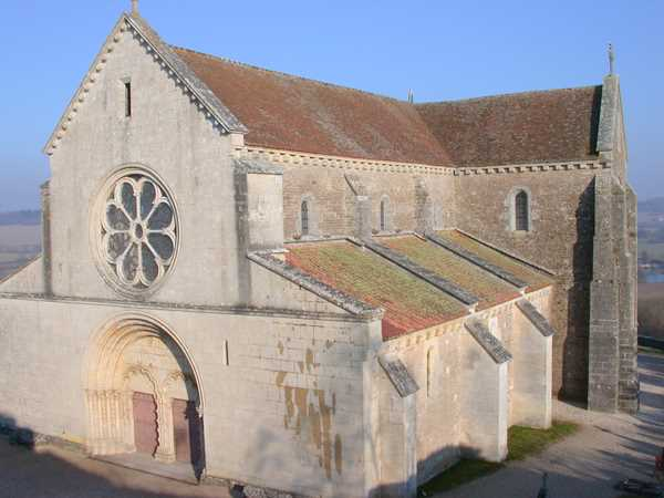 Collégiale Notre-Dame de Montréal (Yonne)